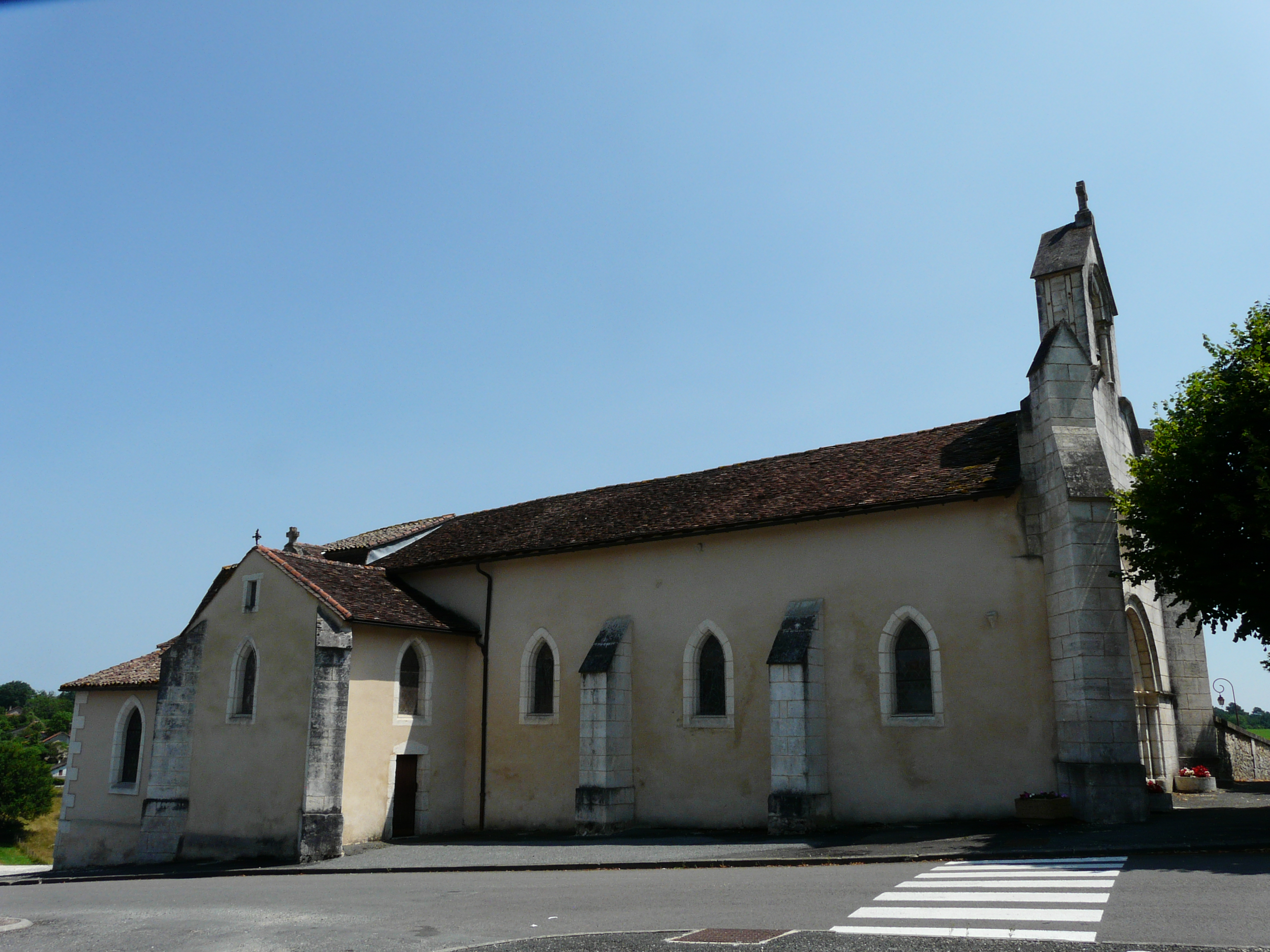 L'église Notre-Dame-de-la-Nativité de Beaupouyet, Dordogne, France.